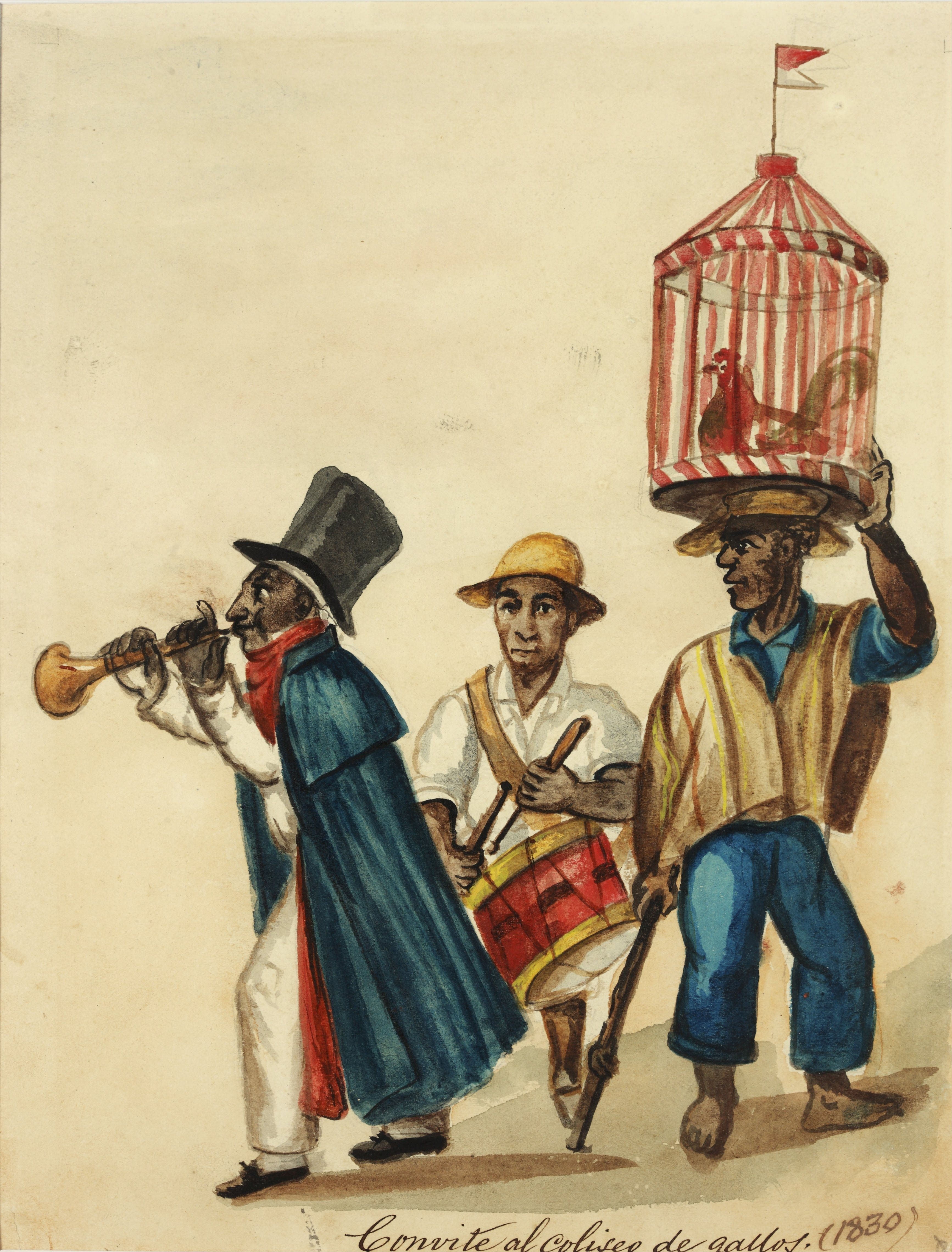 Acuarela de Pancho Fierro (Lima, 1807 - Lima, 1879)